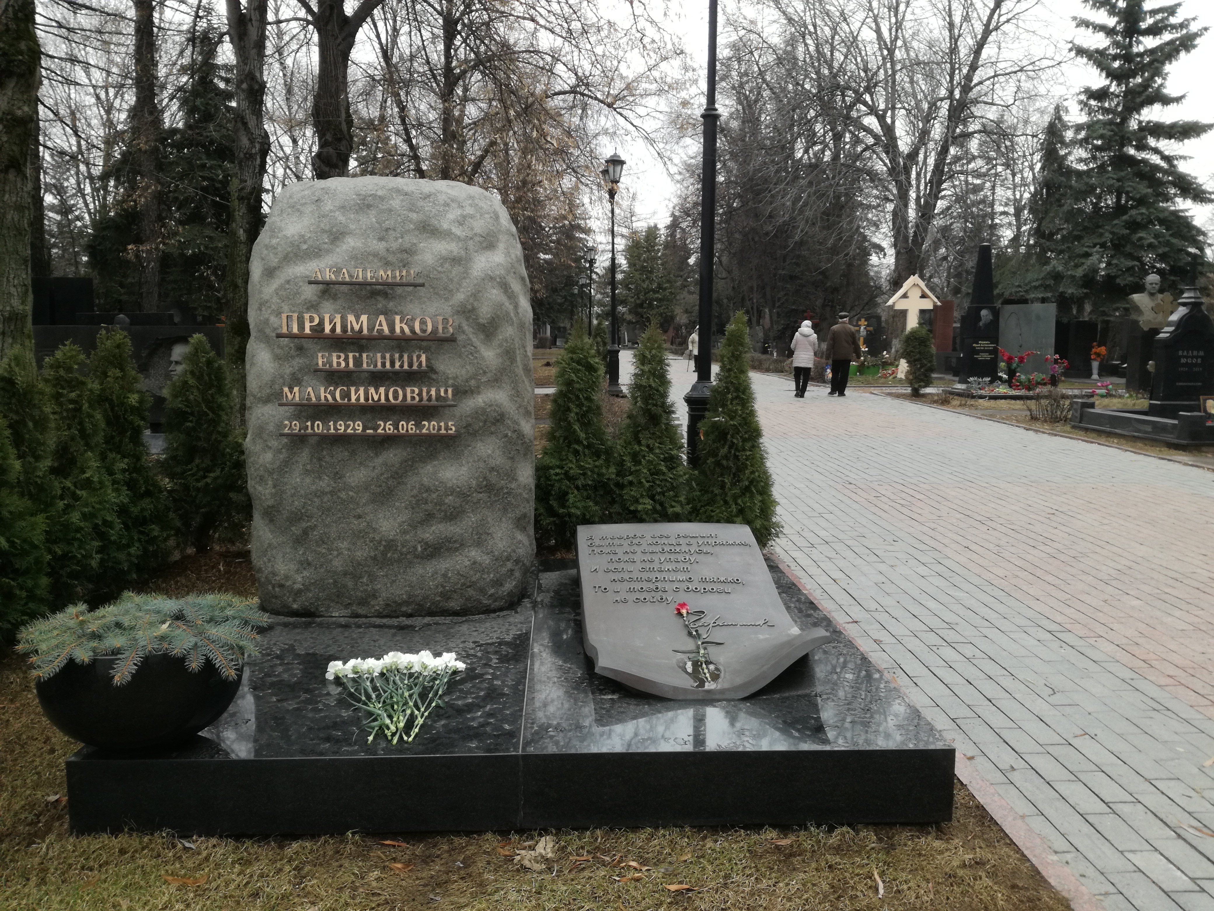 Новодевичье кладбище